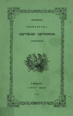 Титульный лист издания истории Вардана Аревелци